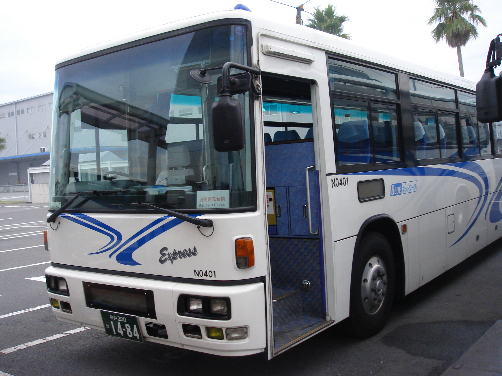 主に大磯号で使用される日産ディーゼル・スペースランナー